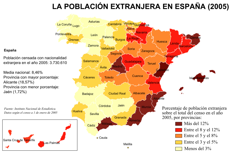 Mapa de España con la distribución de la población de nacionalidad extranjera por provincias, según el censo INE 2005. Creado por Rodriguillo a partir de Image:Provinces of Spain.svg